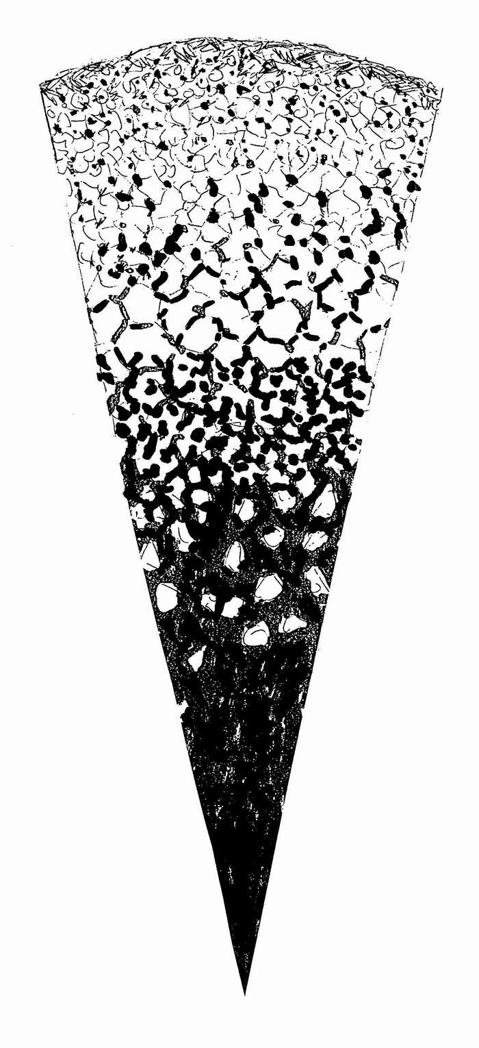 Egy kondritos kisbolygó metszete a differenciálódások után